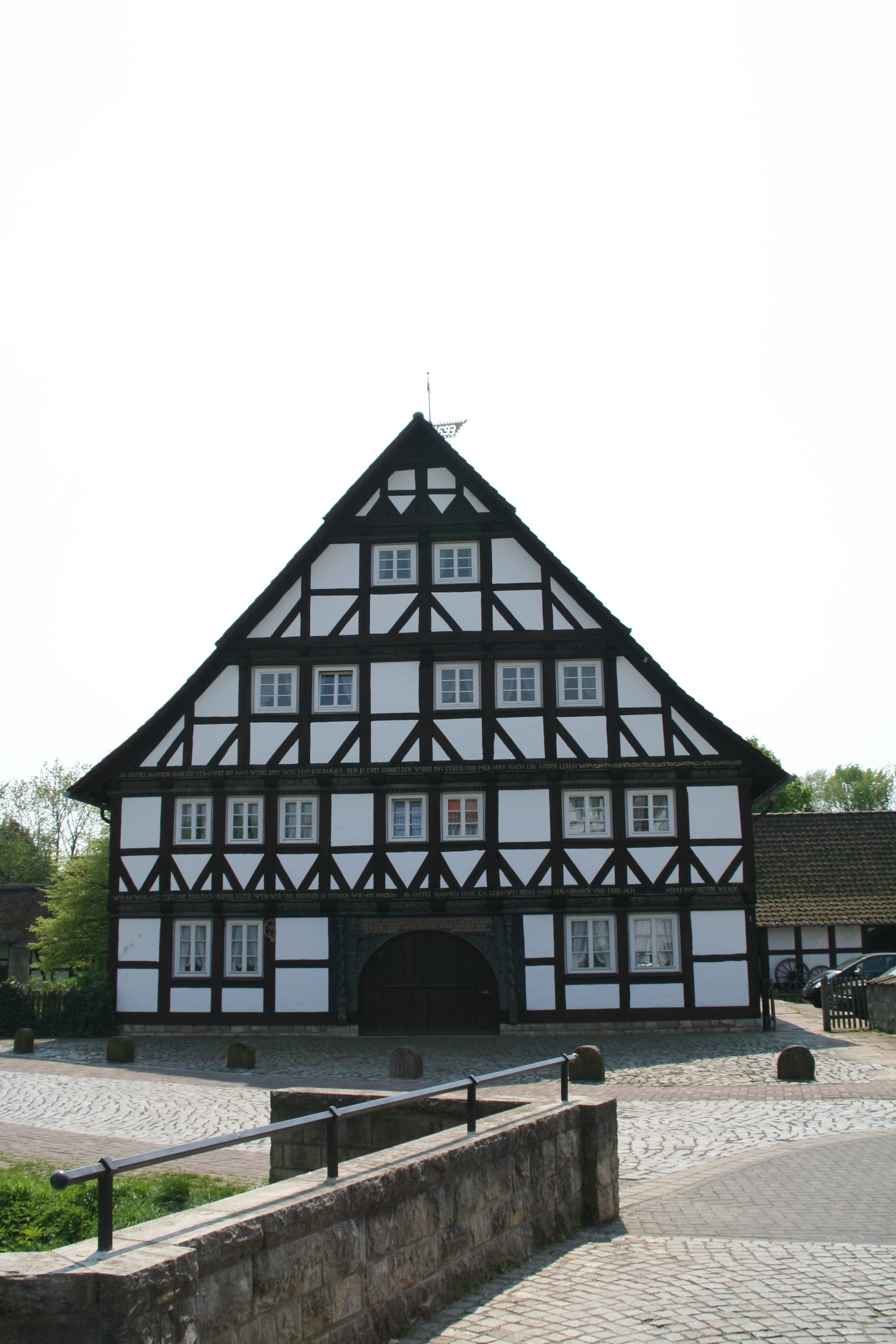 Fachwerksiedlung Riddagshausen Braunschweig